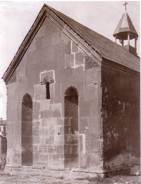 Գեթսեմանի մատուռ